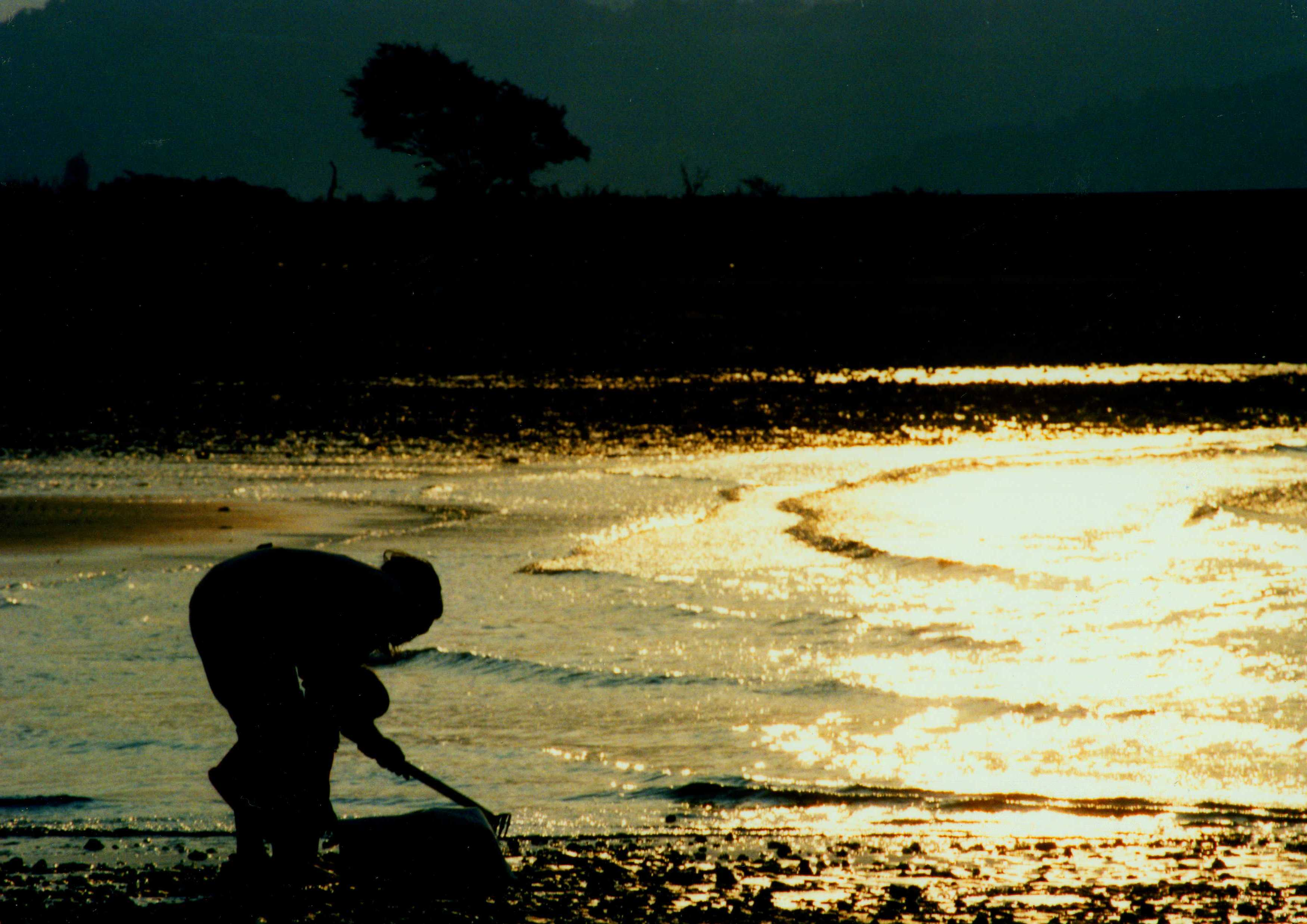 蕪崎の干潟（愛媛県中央市）